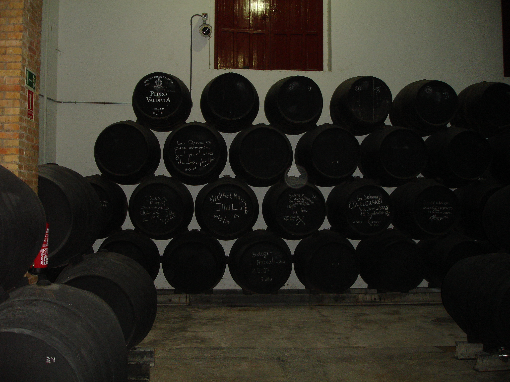 Valdivia in Jerez, Andalusia (Spain)